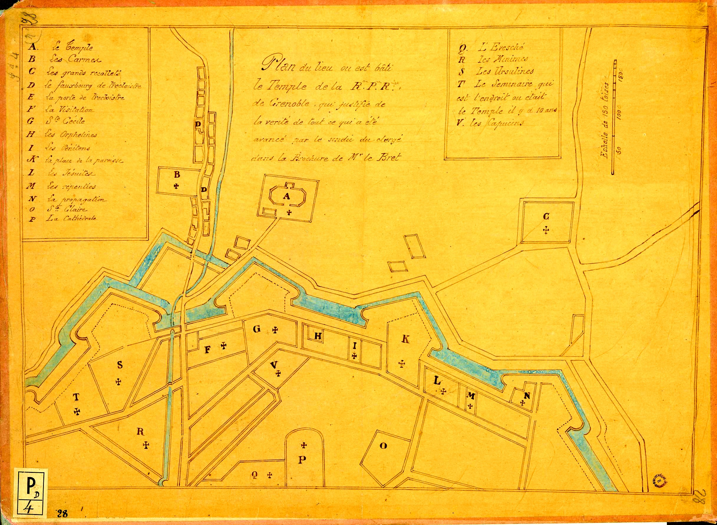 Plan des établissements religieux du quartier Très-Cloître dressé en 1685 pour pointer les nuisances sonores du temple réformé sur les établissements catholiques